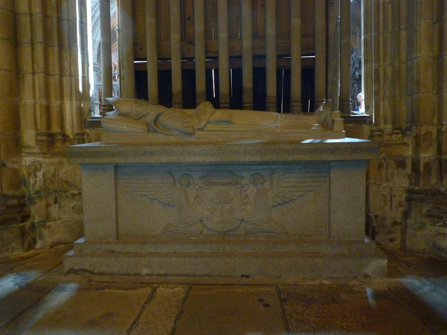 Gisant de Mgr Jean-Baptiste Marie Budes de Guébriant, ancien Vicaire apostolique du Kientchang (Chine) et ancien supérieur général des M.E.P., en la cathédrale Saint-Pol-de-Léon